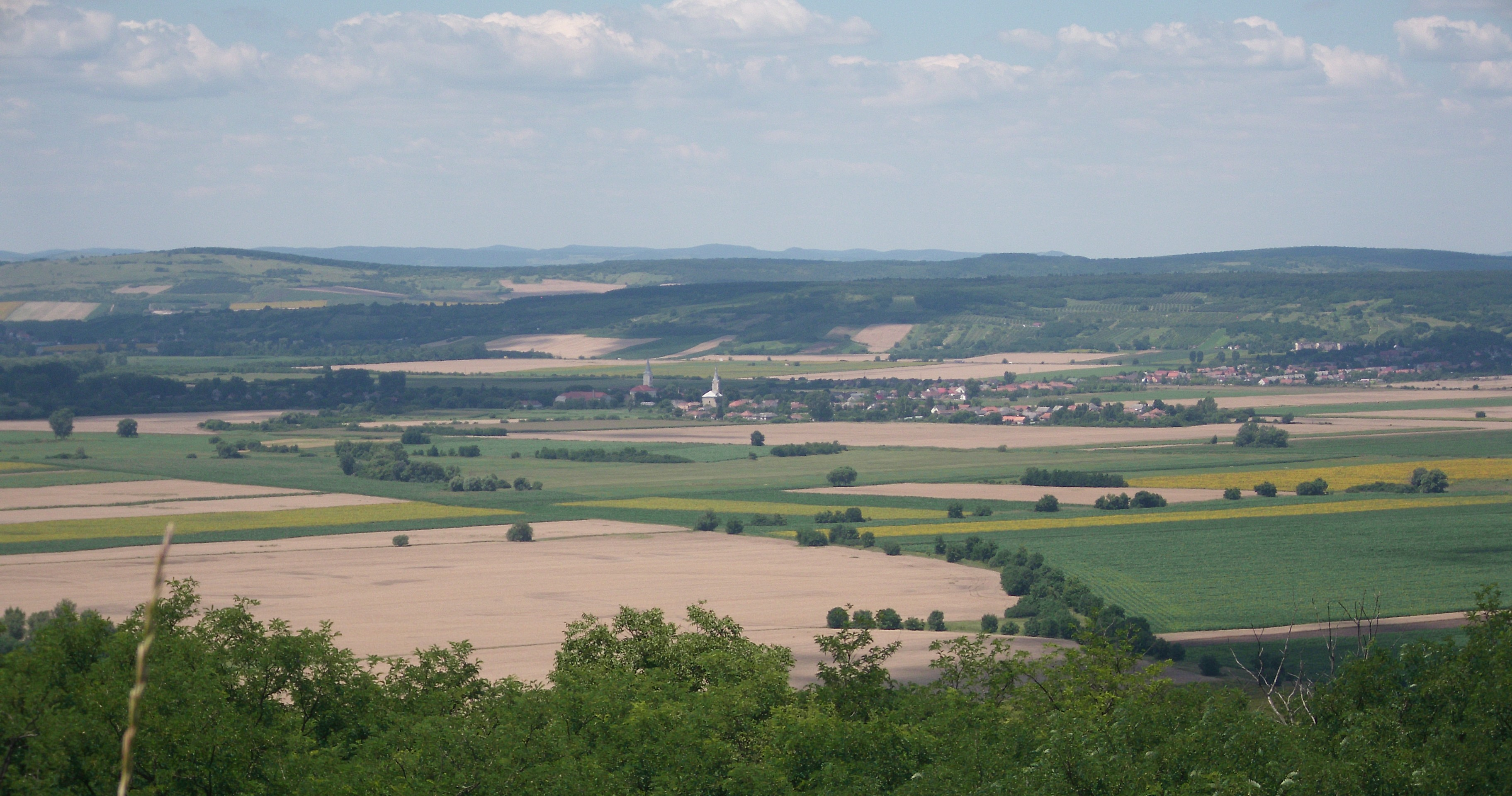 Aszaló látképe a szentistvánbaksai Bikarétről